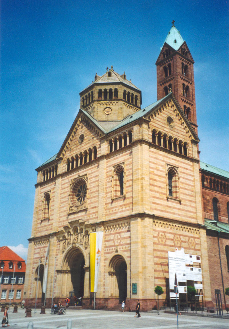 Der Speyerer Dom. Das Eingangswerk, das im 19. Jahrhundert von Heinrich Hübsch in freier Interpretation "rekonstruiert" wurde. Neo-Romanik unter romantizistischer Ägide.